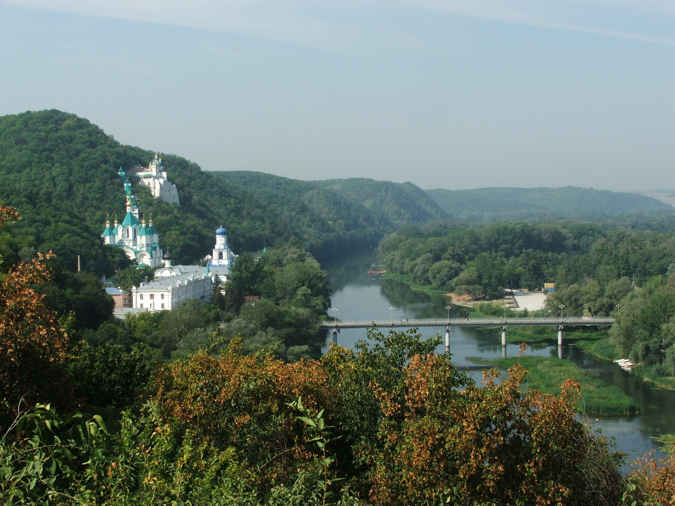 Загальний вид на комплекс пам'ятників Святогірського заповідника. Погляд з гори Артема